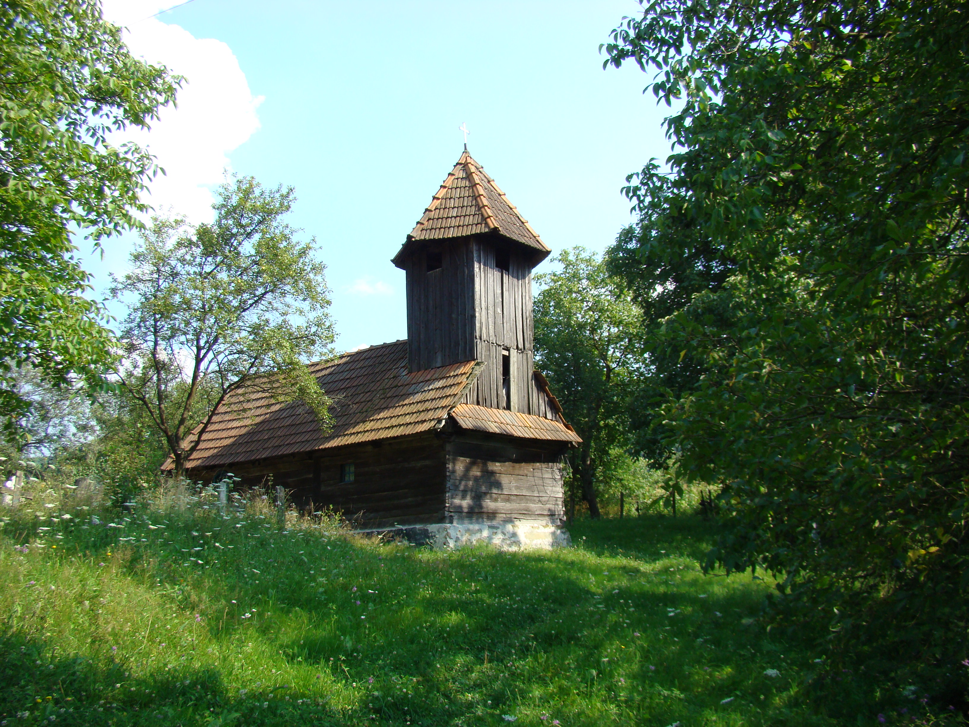 Biserica de lemn „Cuvioasa Paraschiva” Stâncești